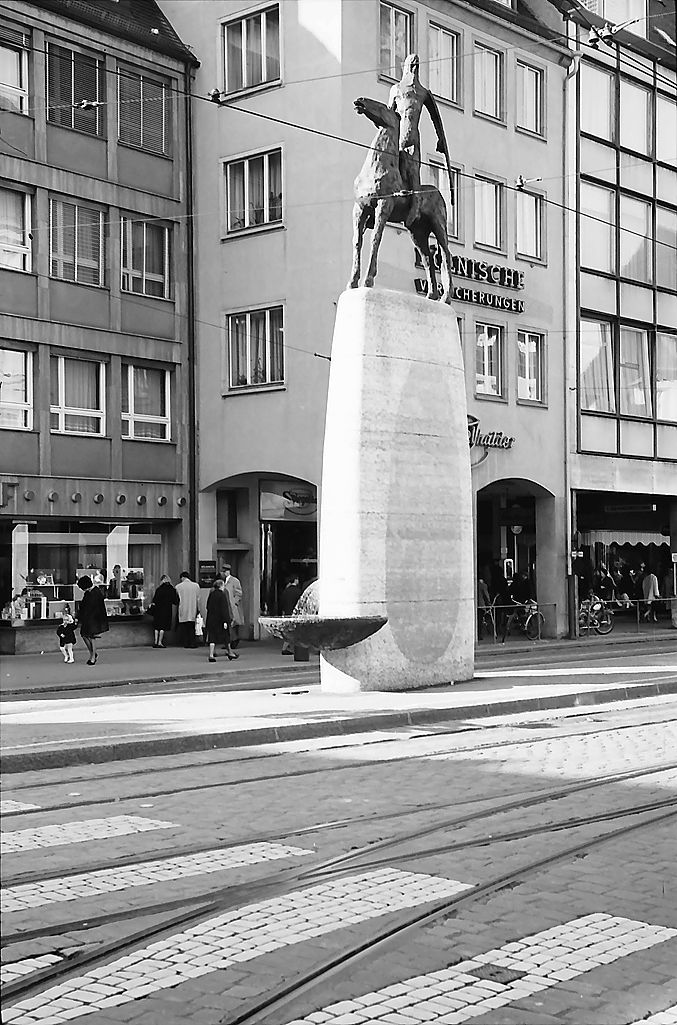 Bertoldsbrunnen mit Brunnenschale von Südosten